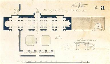 Plano de la Galería de las Grutas, de la Casa de Campo de Madrid. Fue realizado probablemente en el siglo XVIII, dos siglos después de la construcción del citado edificio. Se conserva en el Archivo General del Palacio Real de Madrid (España).